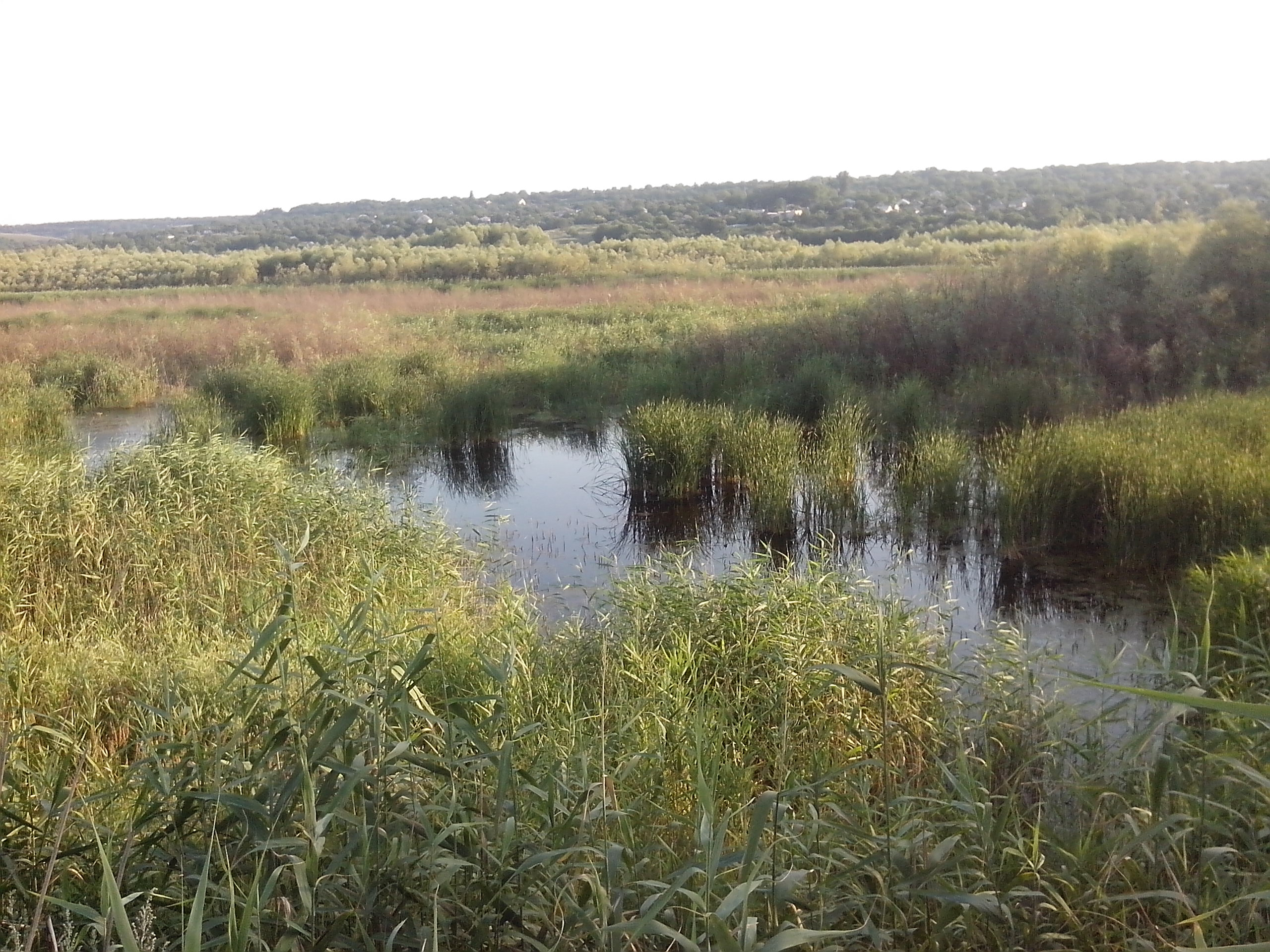 Пейзажі Караухівки